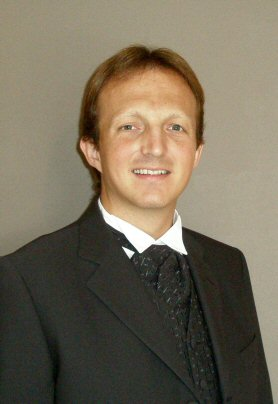 Nico Declercq.